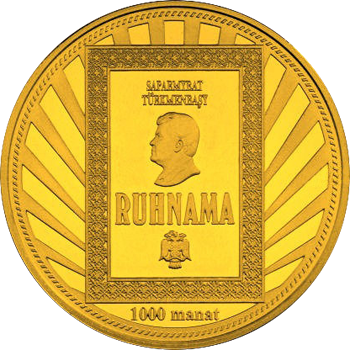 Памятная монета Туркменистана